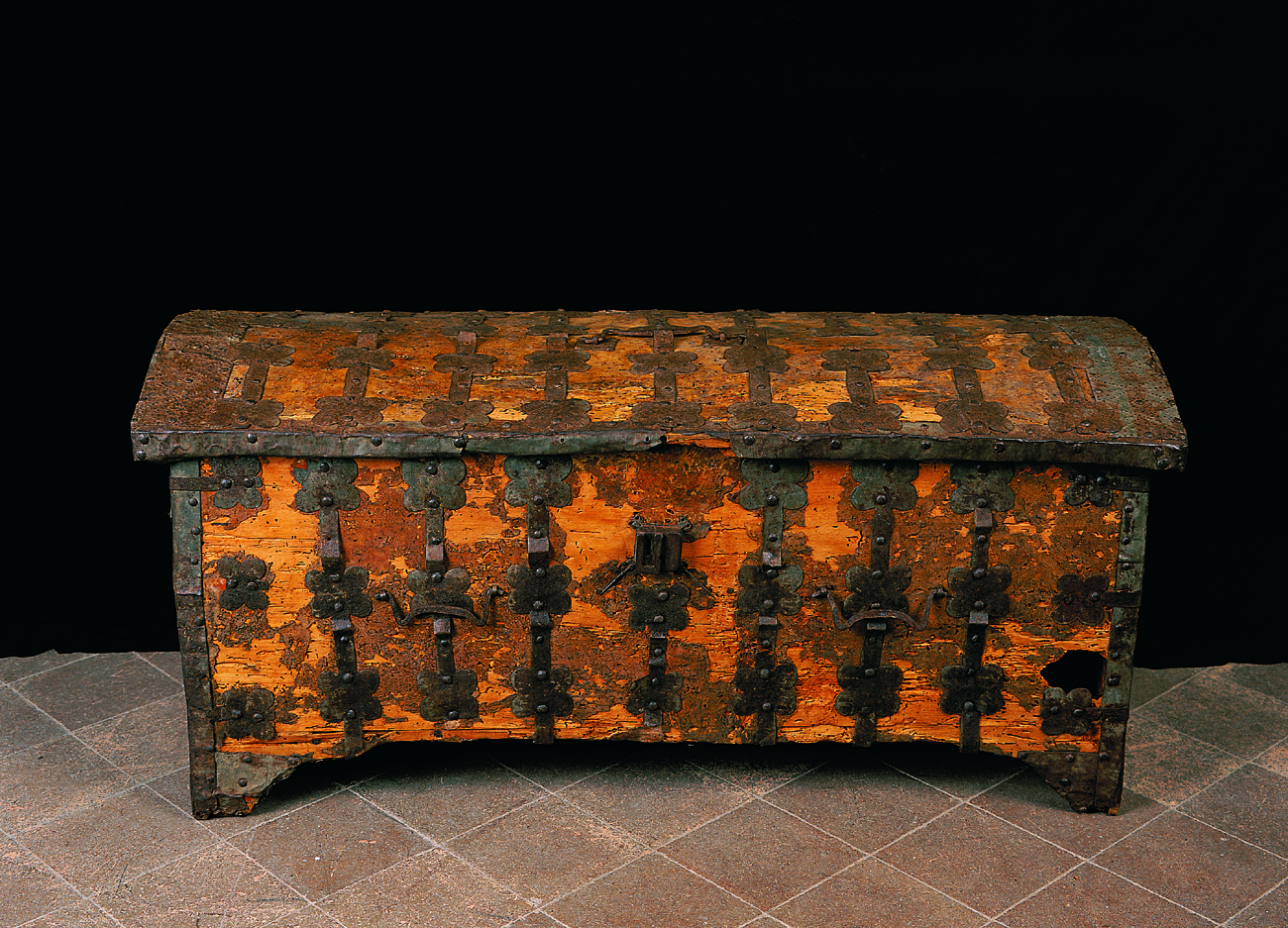 Gothic box known as the Quee'ns Box (14th century)